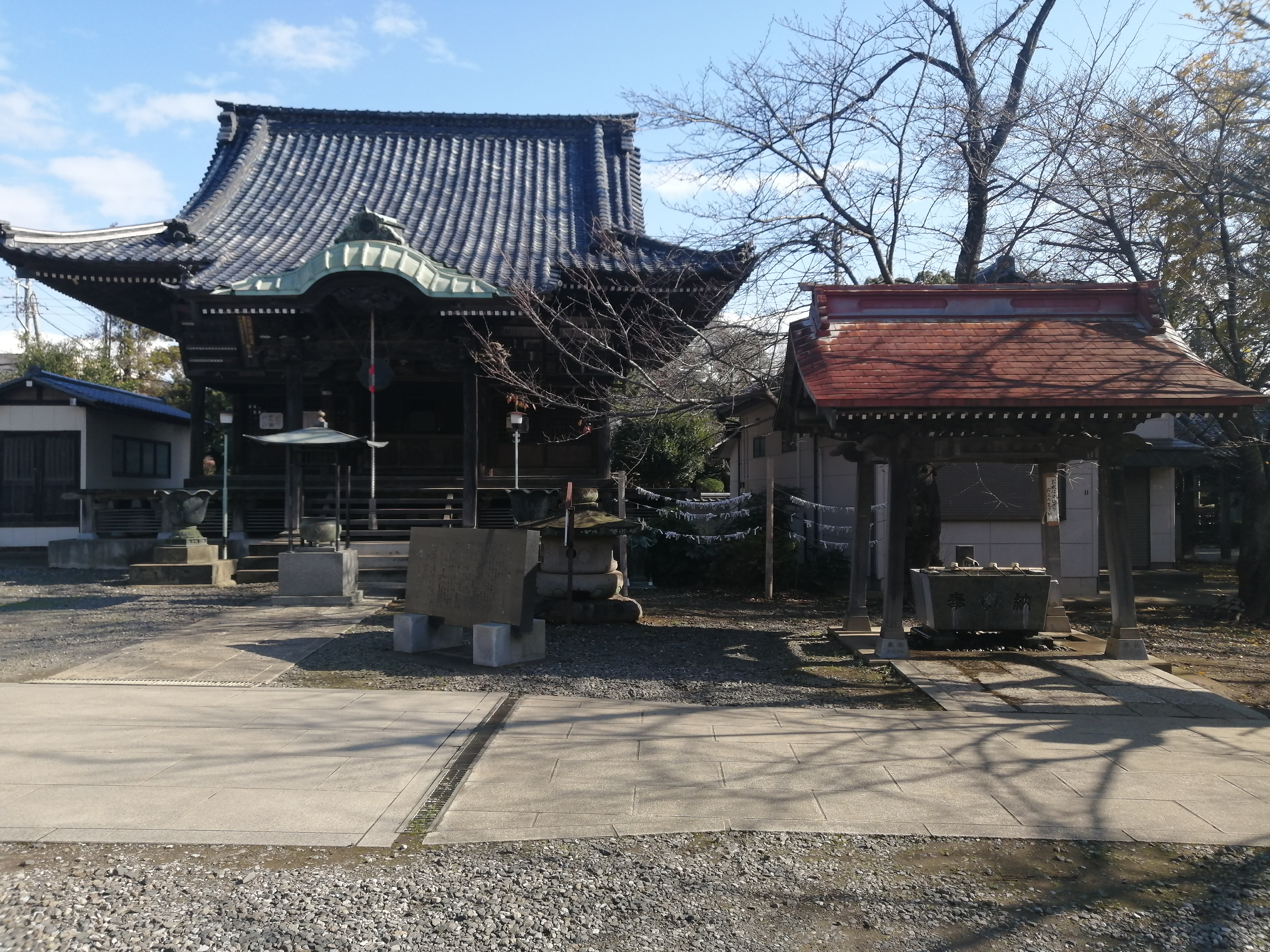 御滝不動尊金蔵寺（千葉県船橋市金杉）